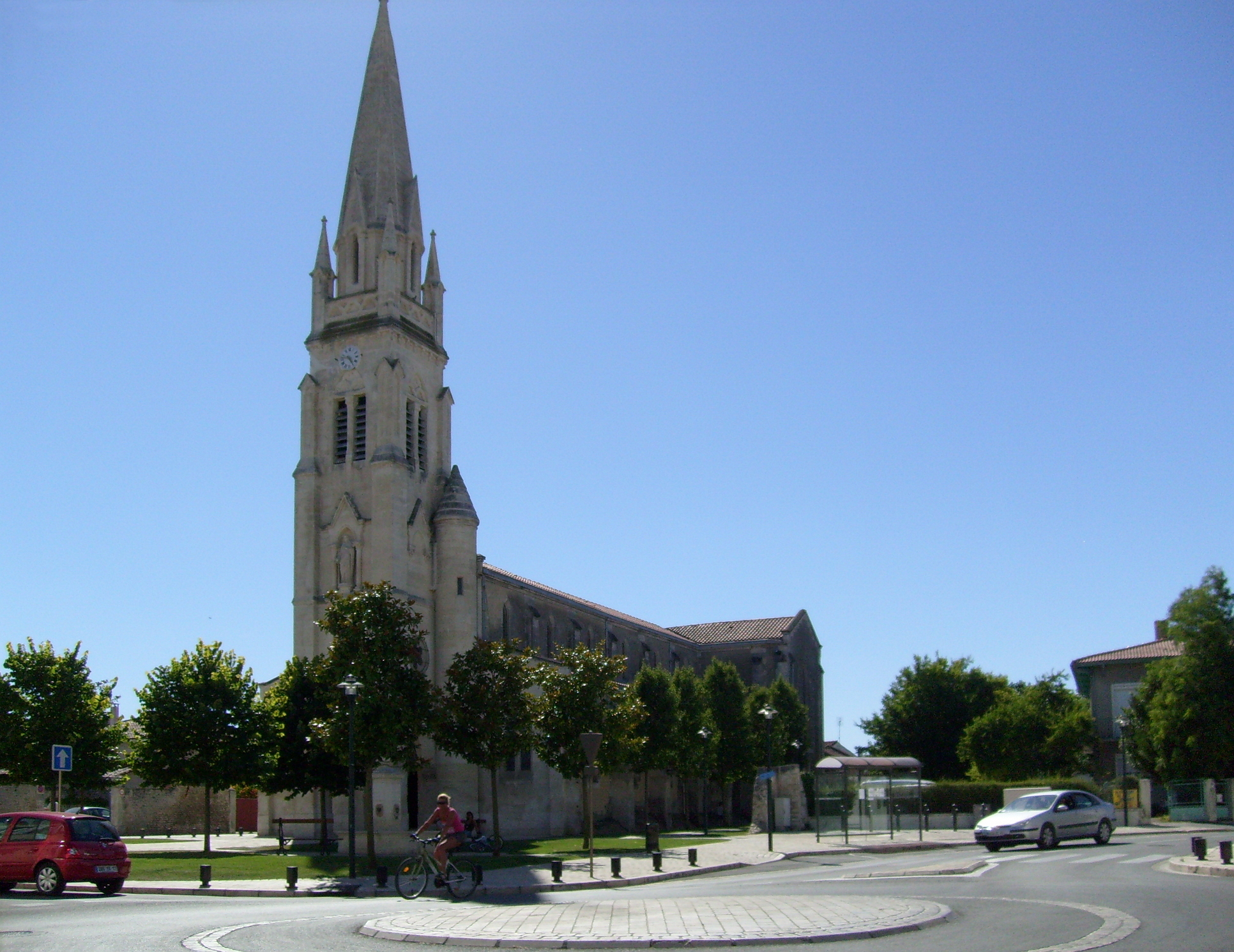 L'église du sacré-coeur de La Tremblade